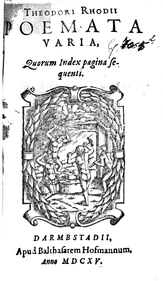 Titelblatt eines Werkes des späthumanistischen Dichters Theodor Rhodius (+ 1625)